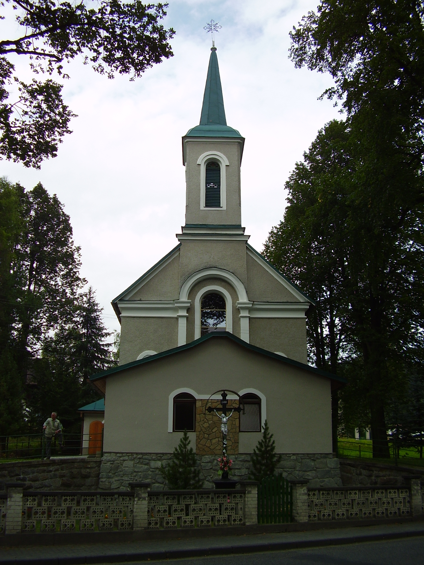 Michalová, okres Brezno, Slovakia